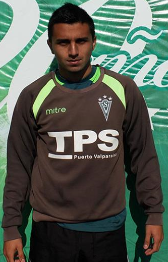 Edición de la fotografía "KevinFlores.jpg", que muestra al jugador de fútbol Kevin Flores.